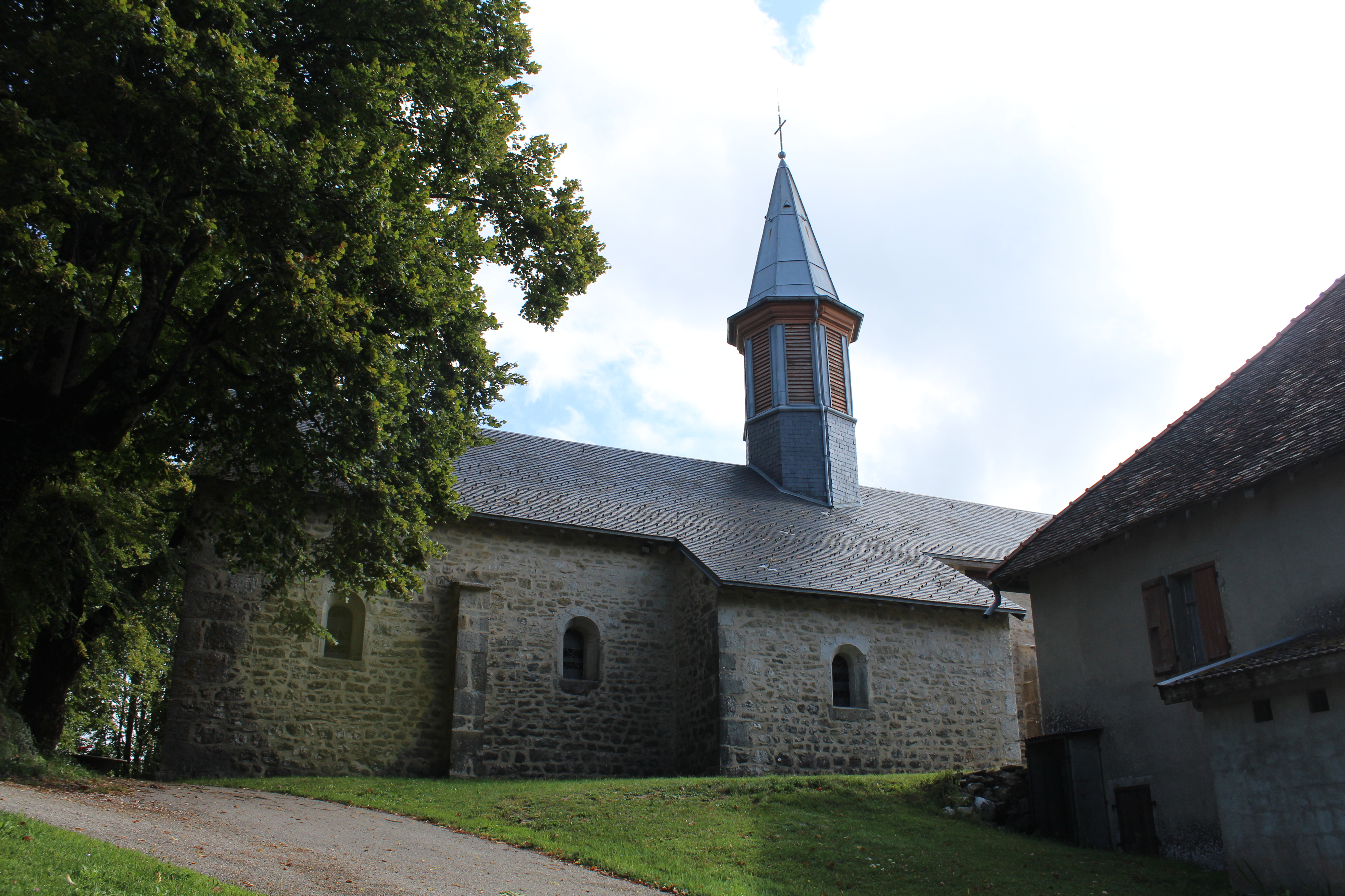 Église Saint-Antoine d'Ordonnaz.